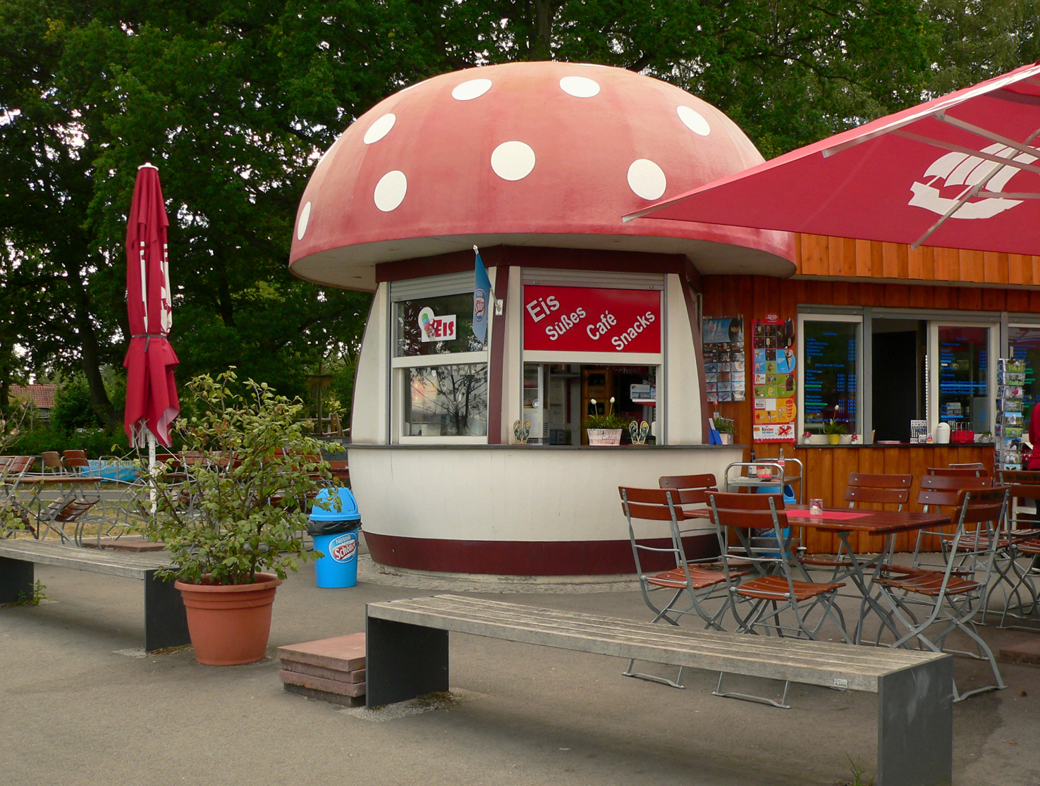 Milchkiosk Mardorf